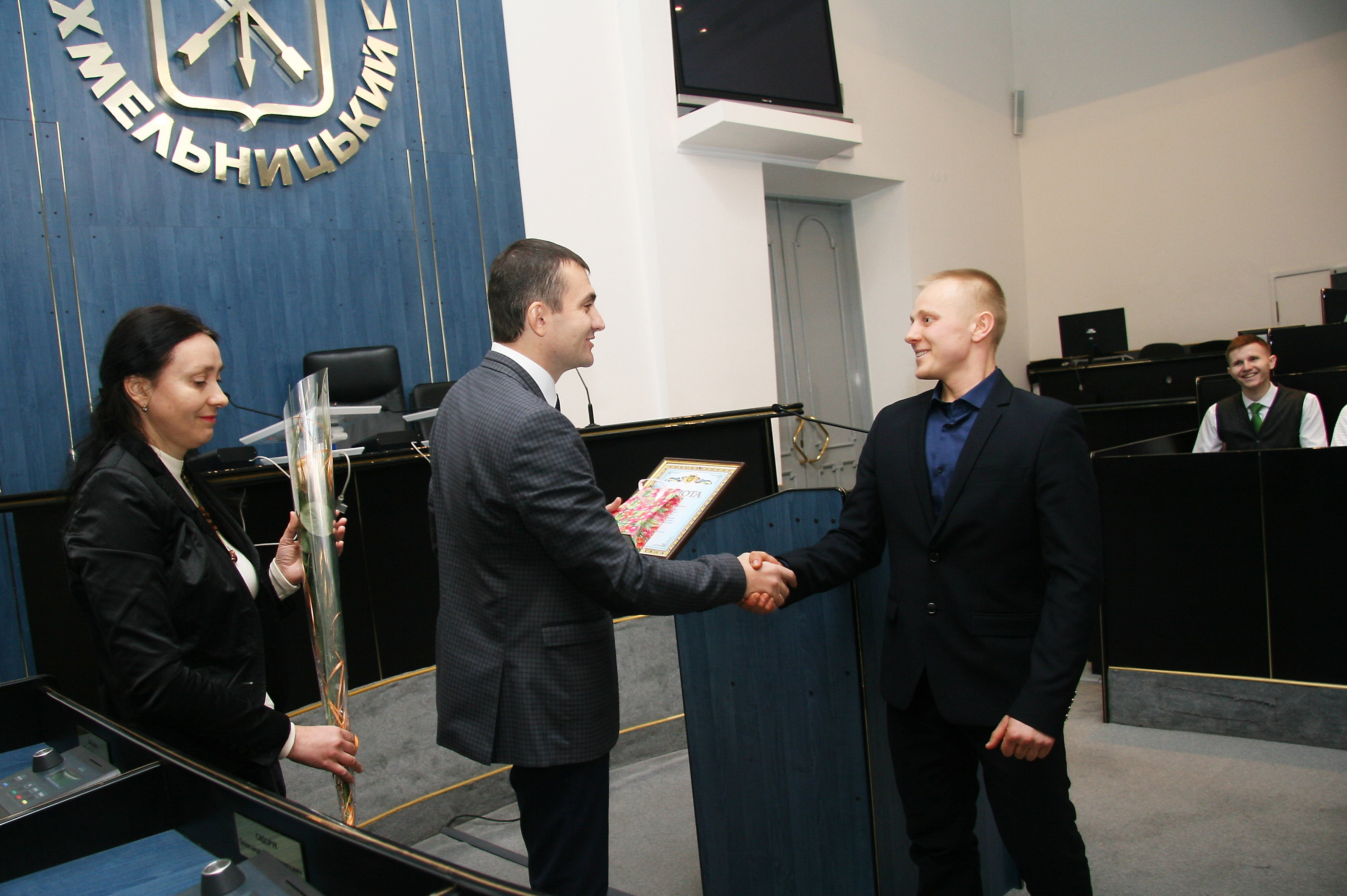 Почесні відзнаки з нагоди Міжнародного дня студента - 2016 рік.